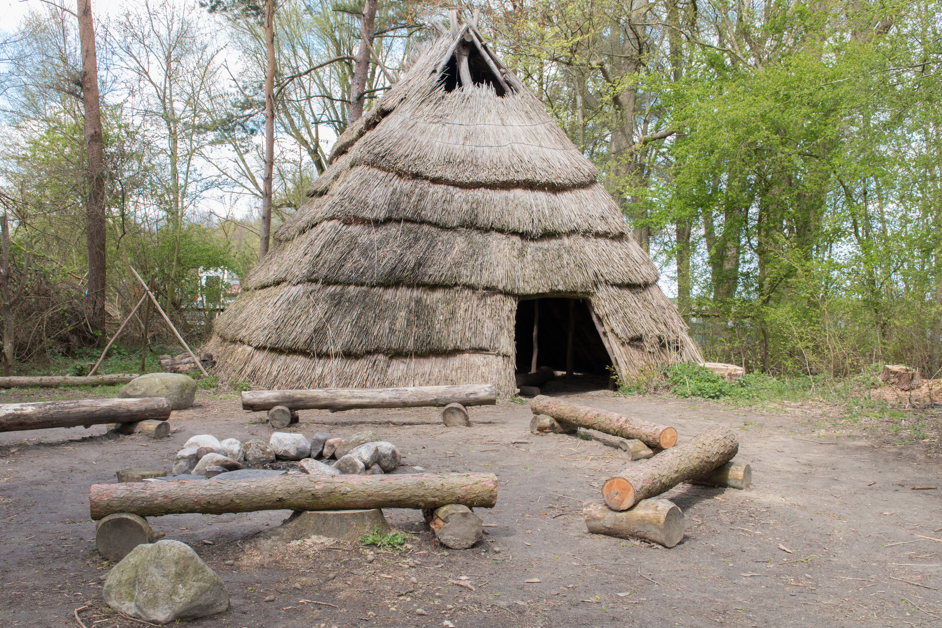 Steinzeithaus für Führungen mit Kindern im Natureum Niederelbe